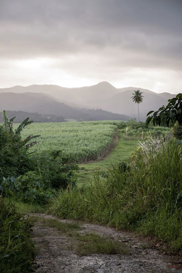 vers le palmier